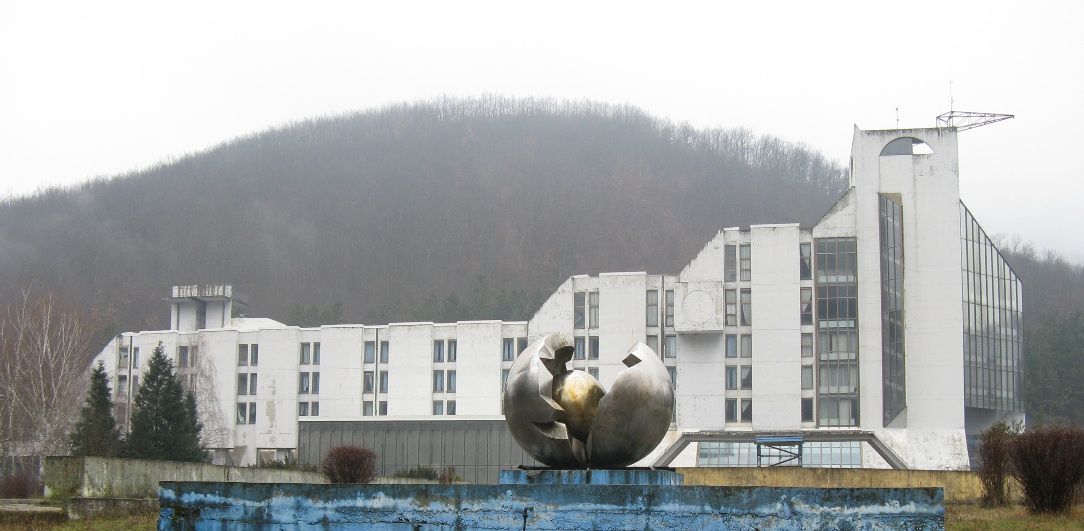 Kuršumlijska banja